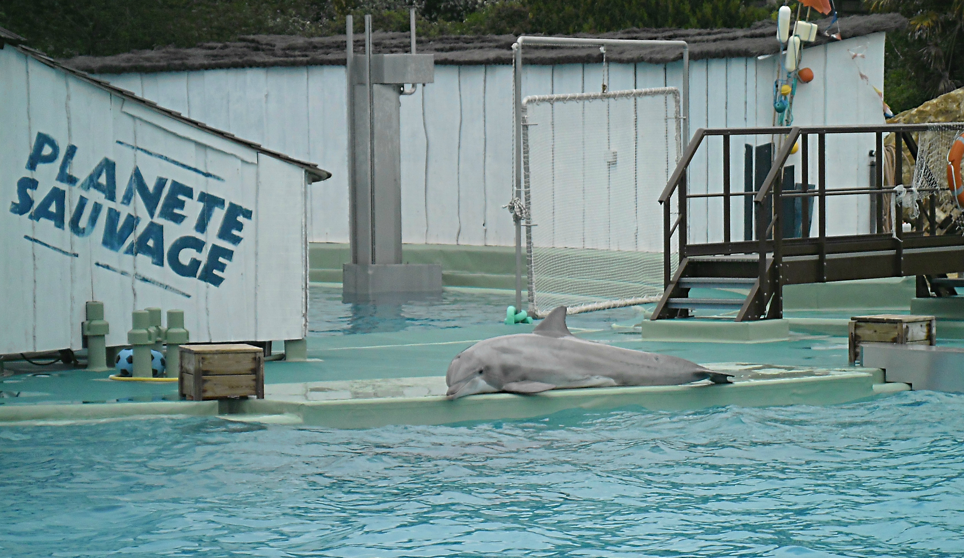 Planète sauvage 2013